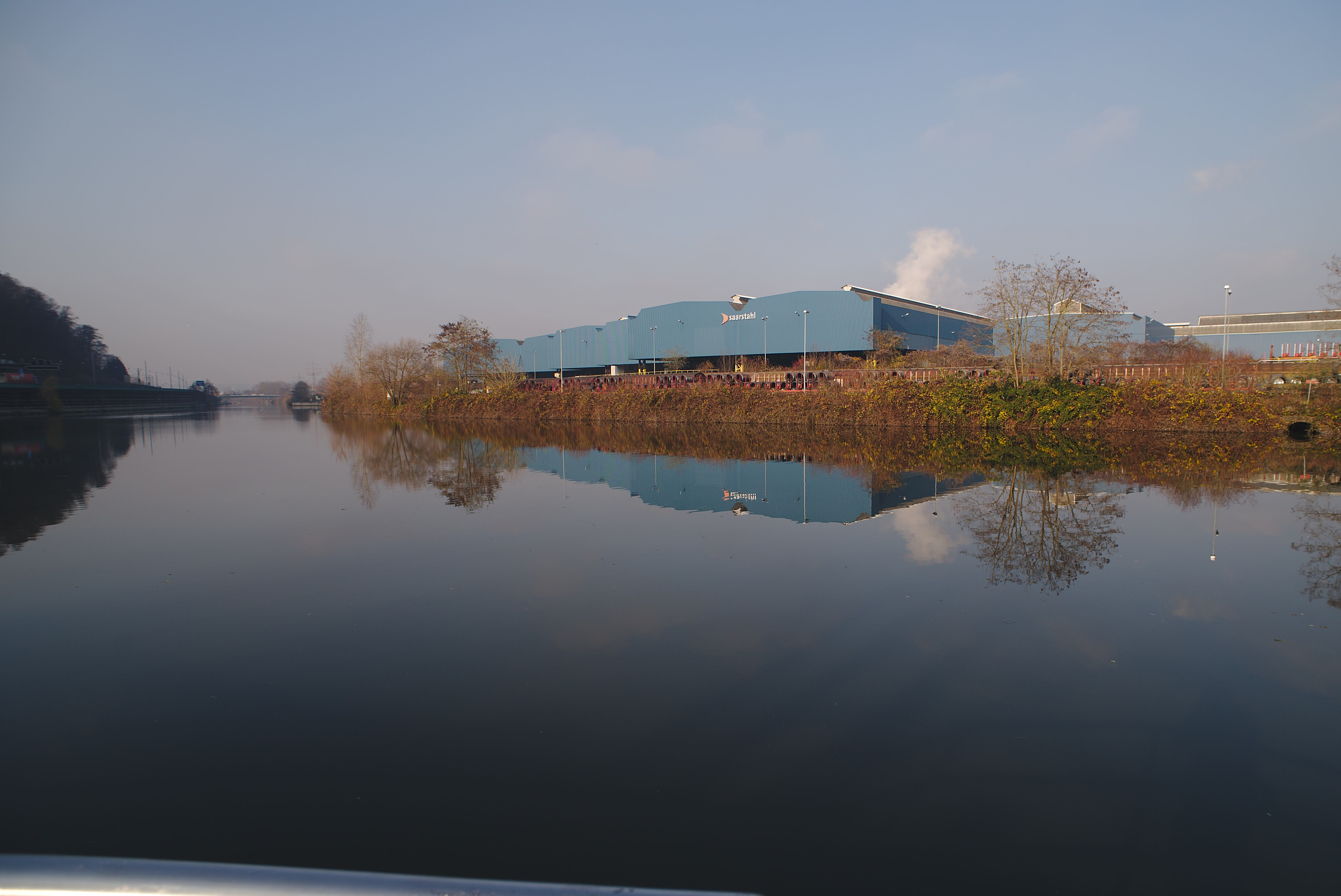 Blick von dem anderen Ufer der Saar auf das Saarstahl Werk in Burbach, deren Spiegel im Wasser zu sehen ist.